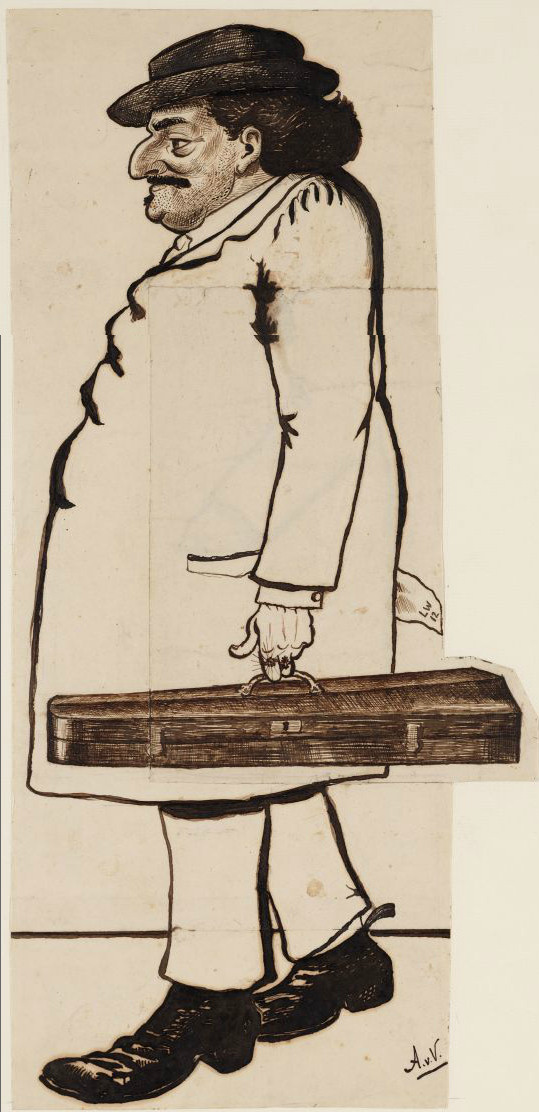 De violist Louis Wolff afgebeeld door Arie van Veen